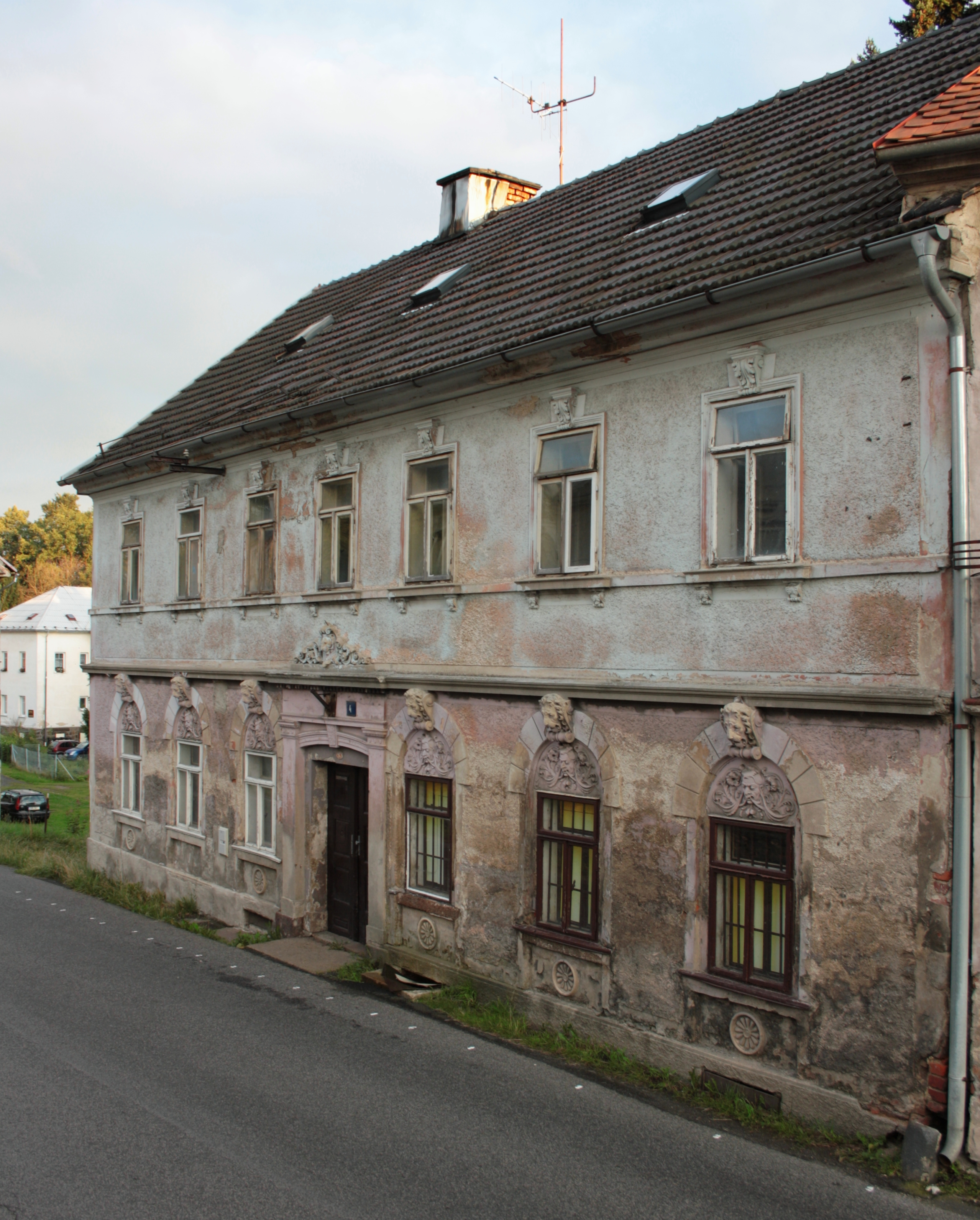 Mikulášovice